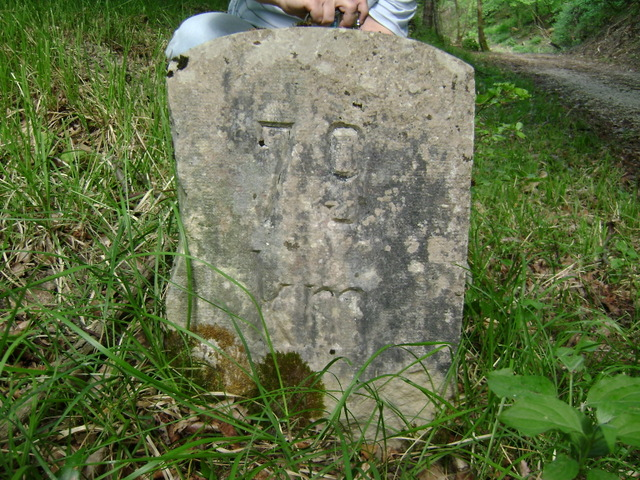 Kameni stupić s kilometarskom oznakom na trasi Parenzane.